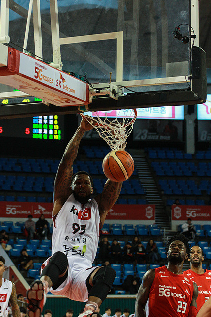 2월 13일 서울SK VS 부산KT